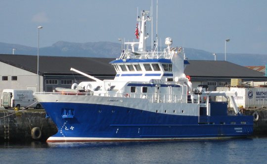 Norwegian resarch vessel Gunnerus IMO Number: 9371361 Callsign: LNVZ